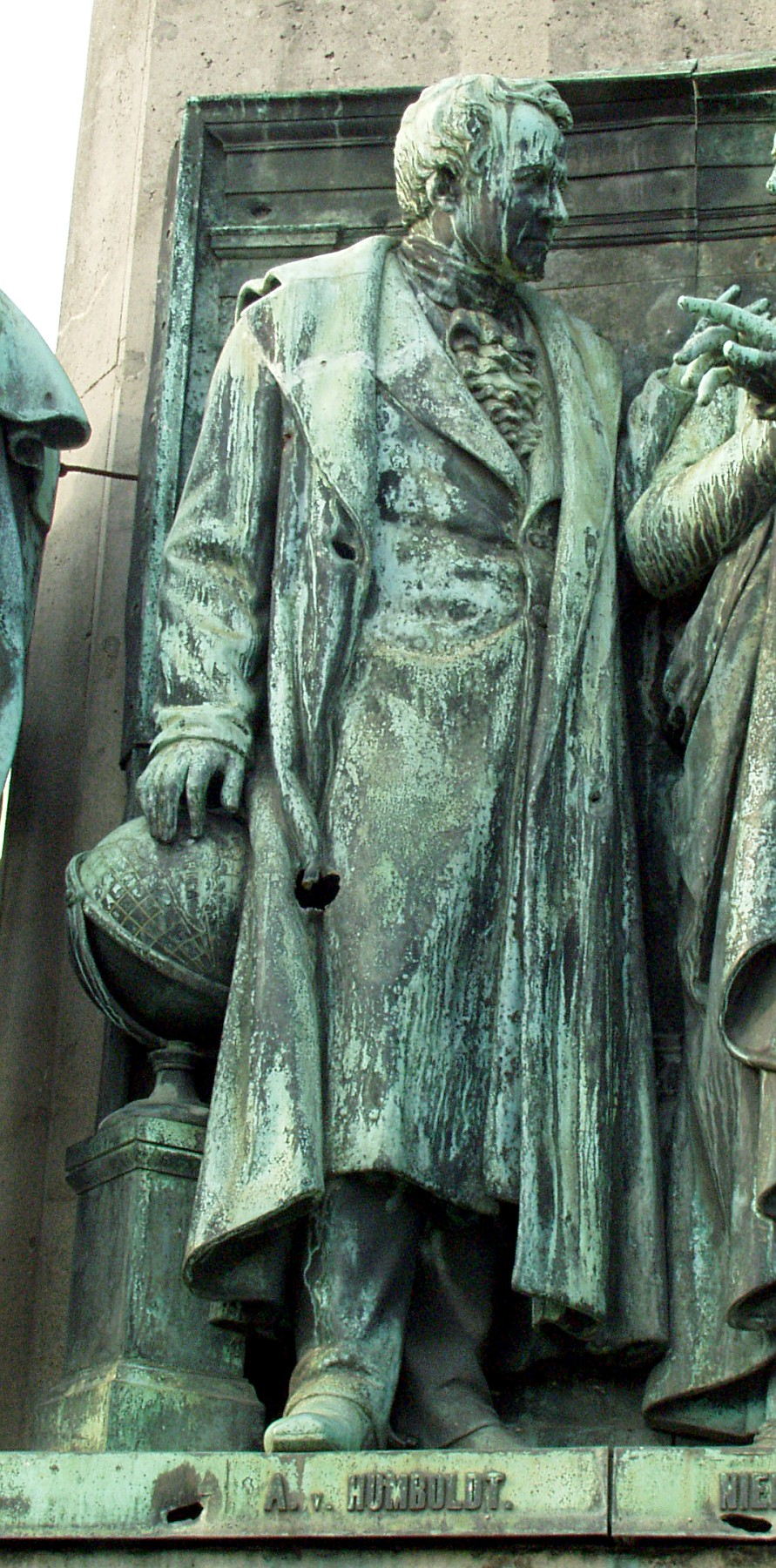 Friedrich Wilhelm III--Reiterstandbild auf dem Kölner Heumarkt.Detail: Alexander von Humboldt